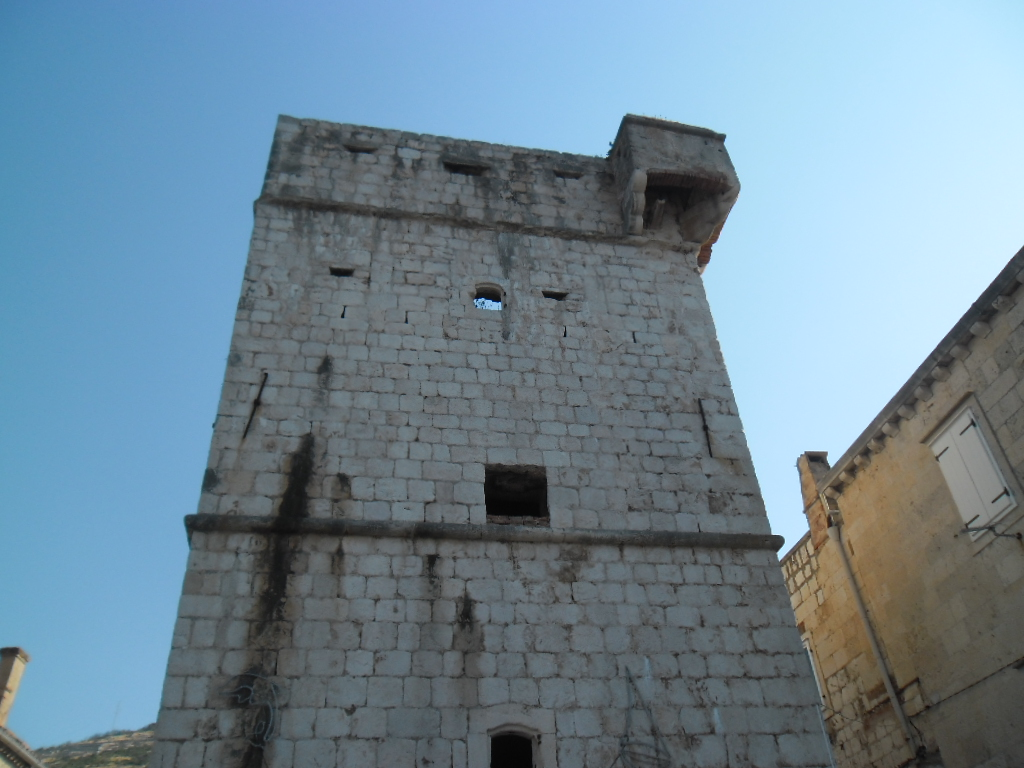 grad Vis